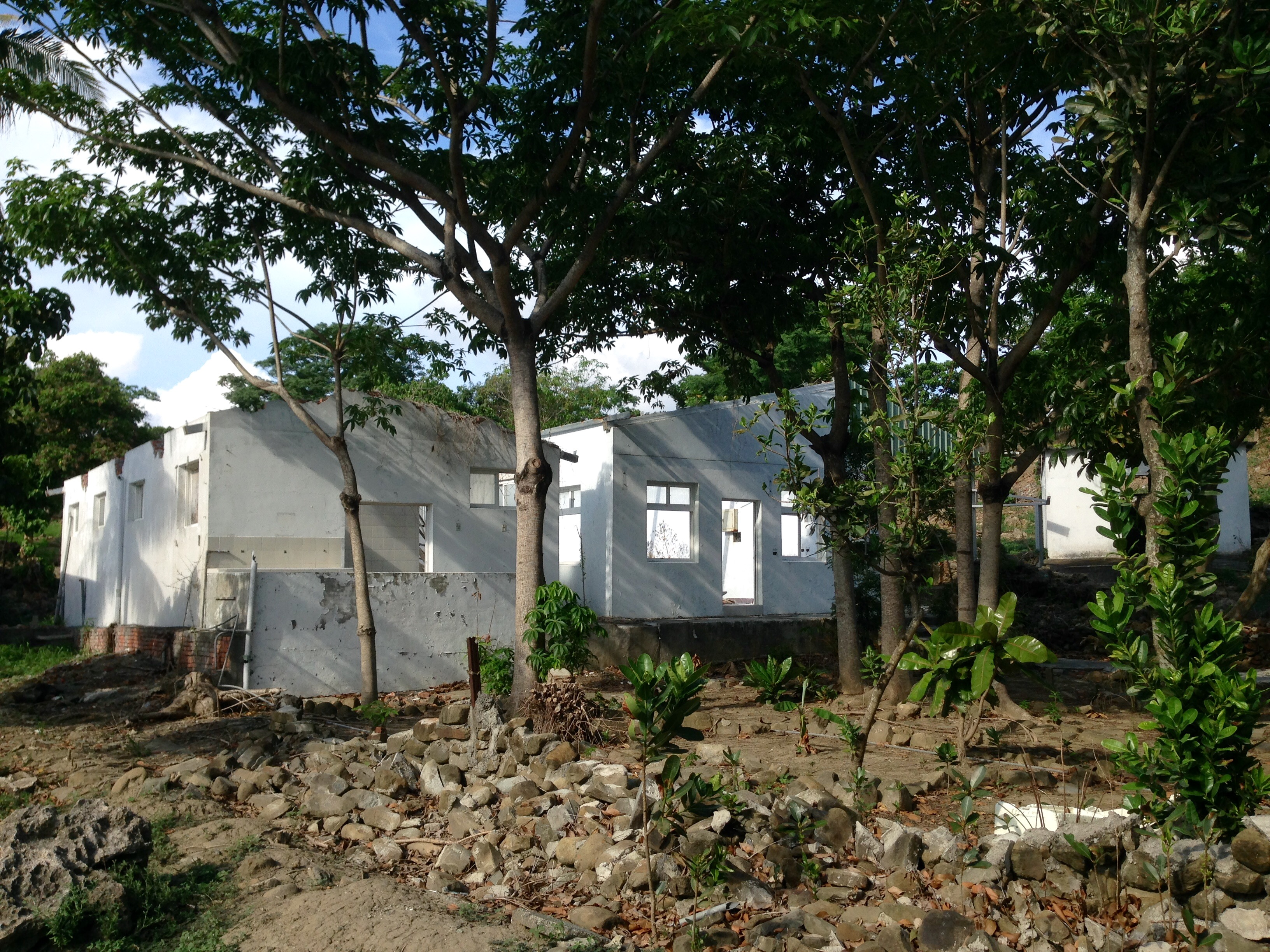 中文（台灣）: 猴洞山海巡署南區巡防局第六三岸巡大隊軍營